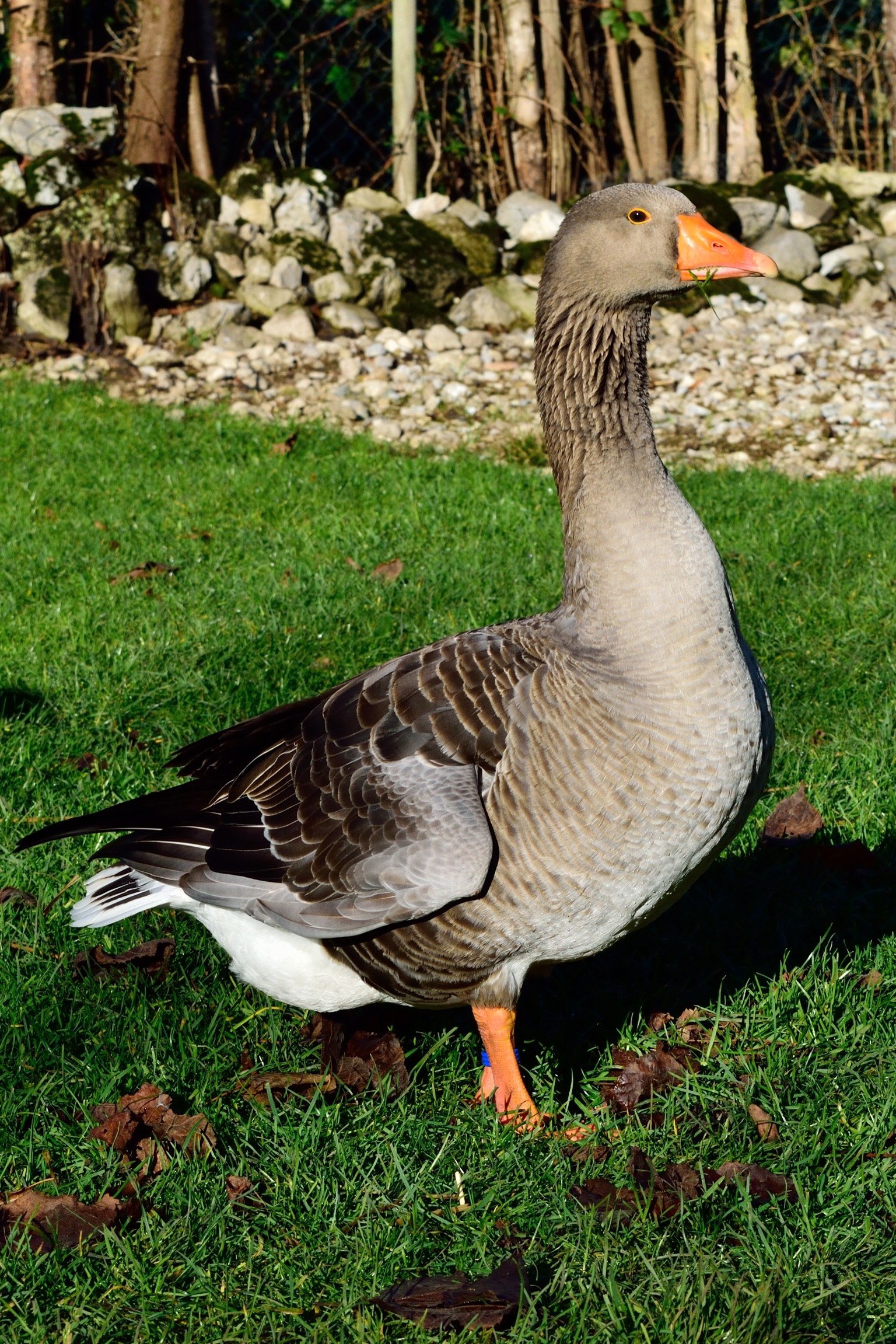 Bayerische Landgans